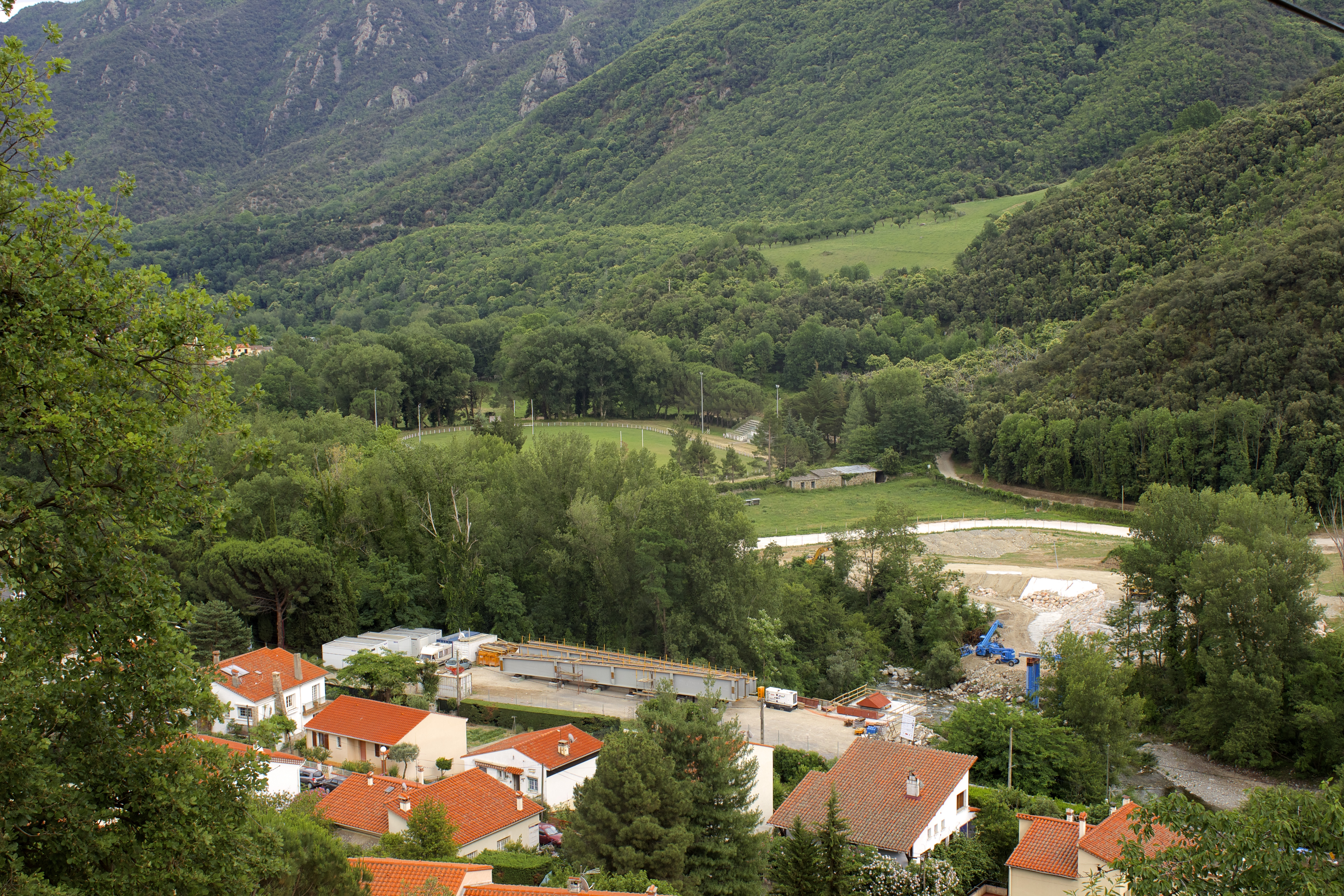 Vue du chantier de reconstruction du pont de Can Bia, à Arles-sur-Tech, depuis la route de Corsavy.